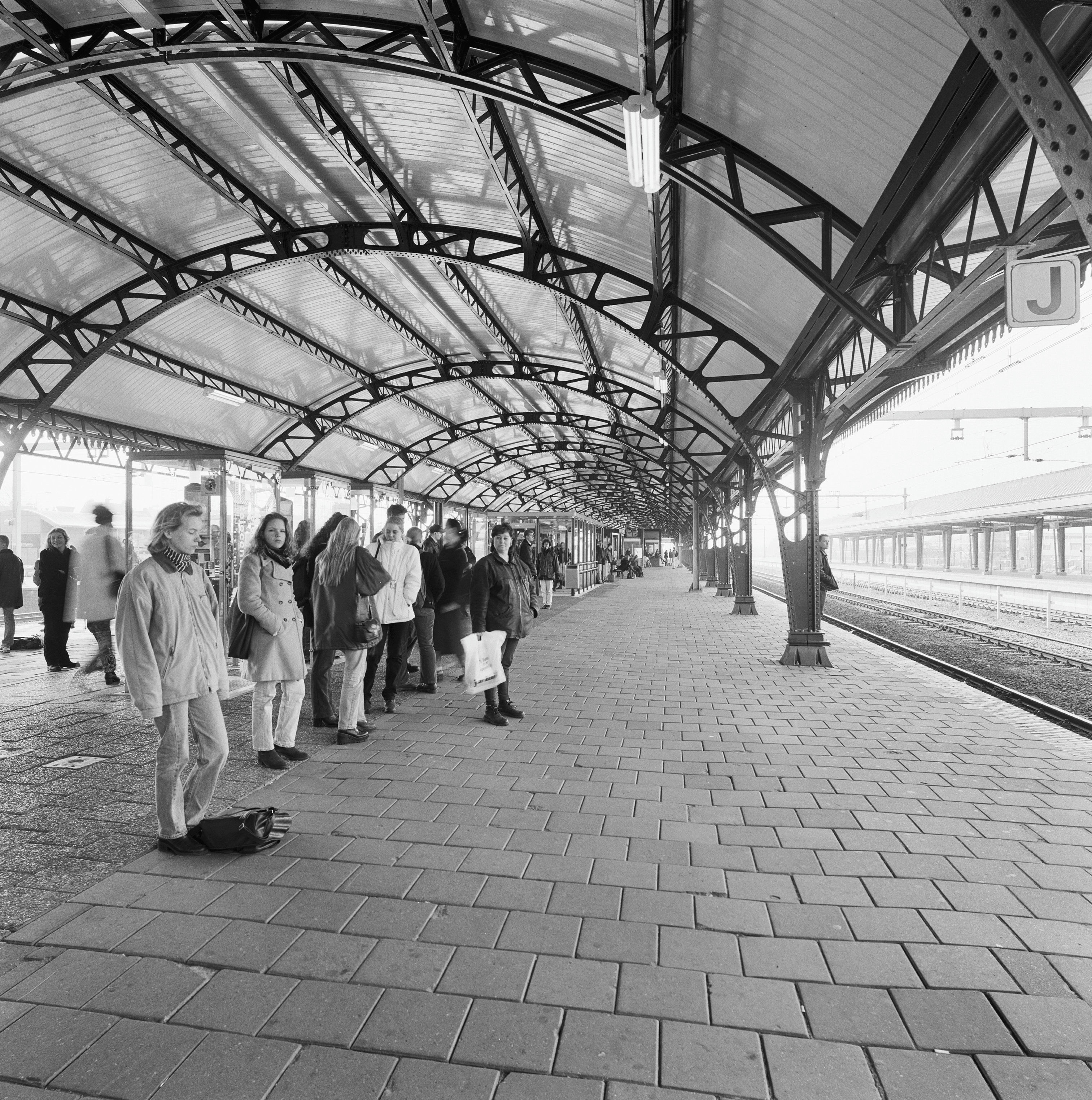 N.S. Station: Overzicht perron met spanten en kolommen